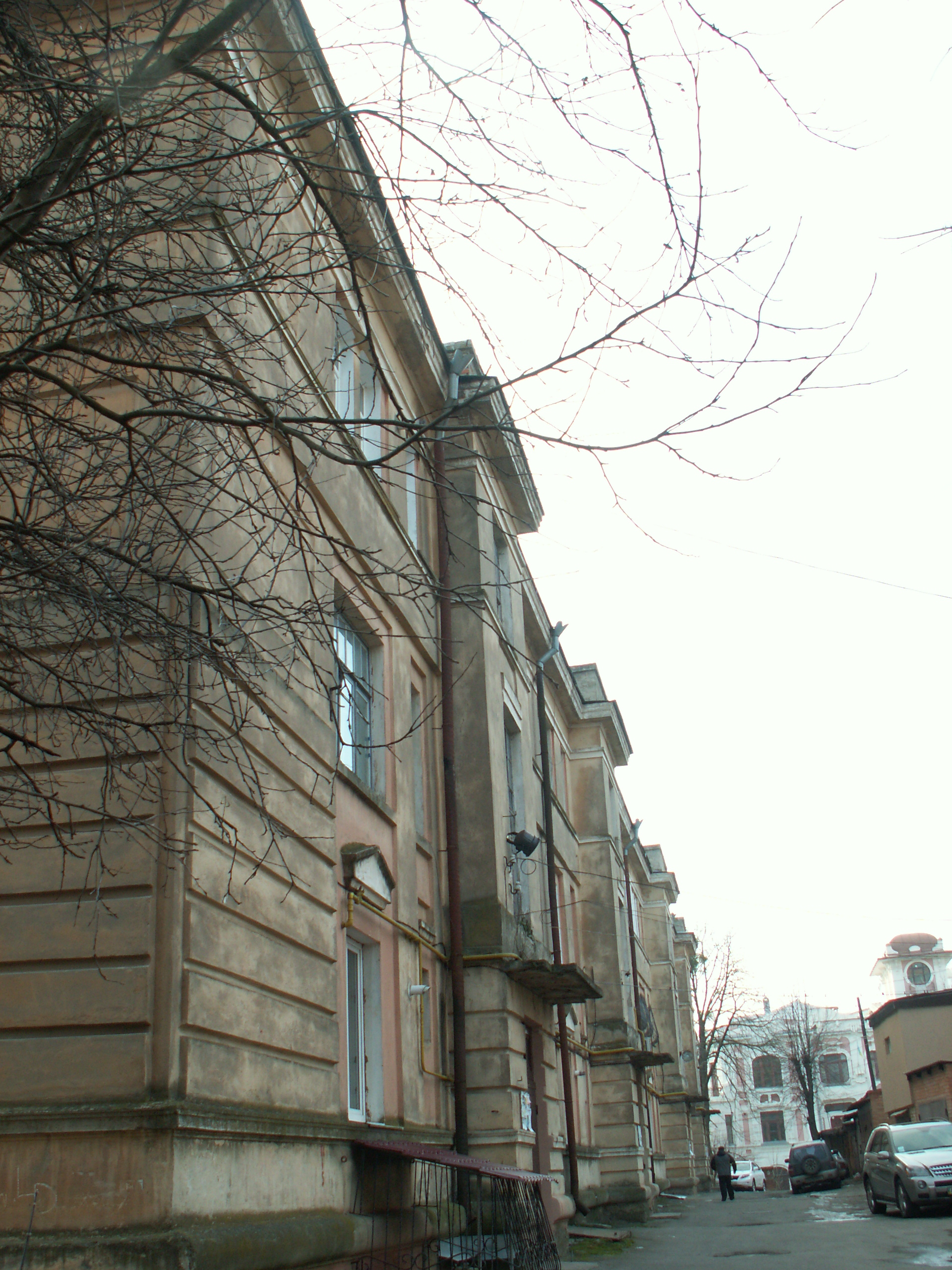 Vinnytsia Pushkina Str 25